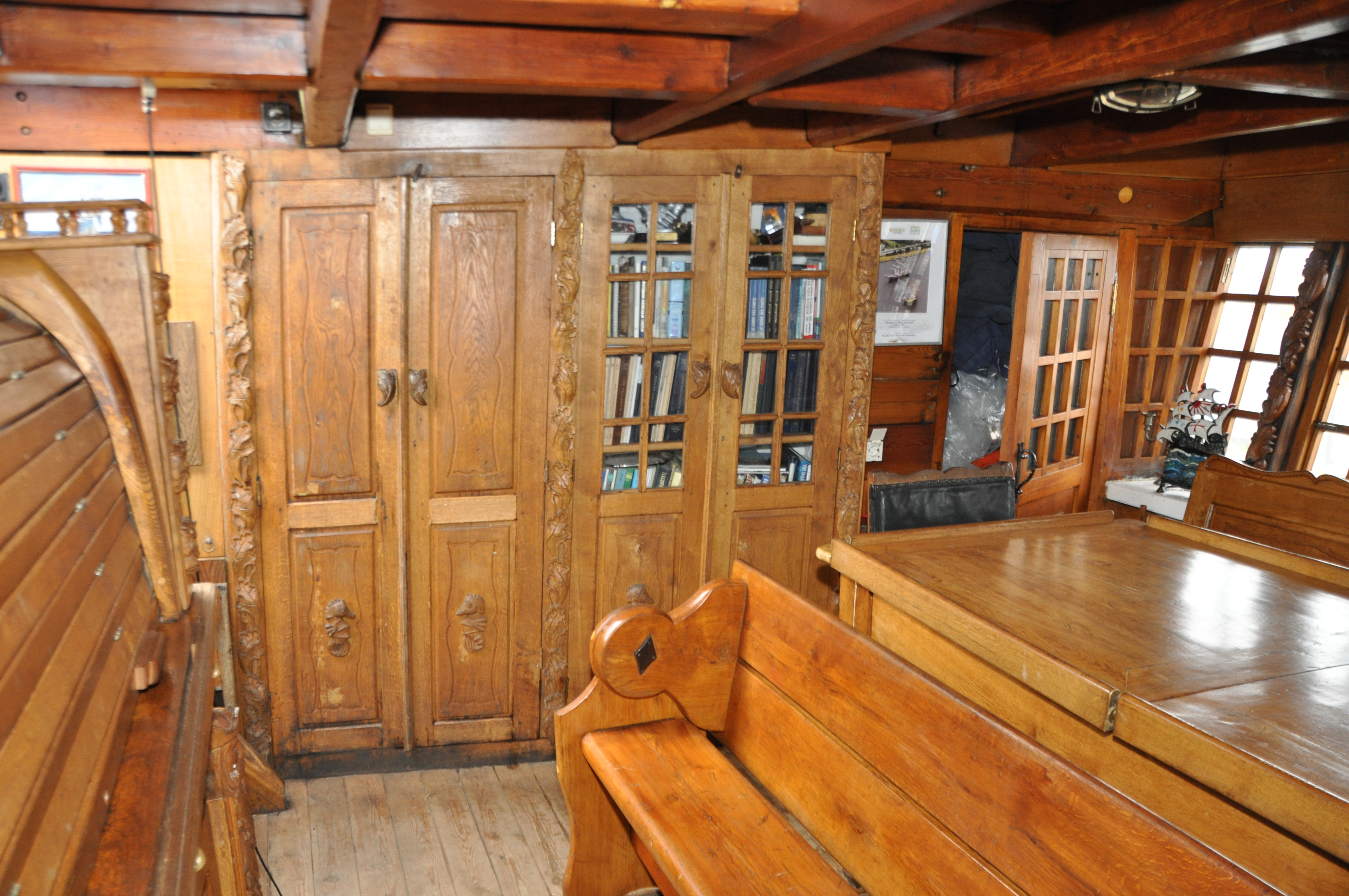 Interieur van de kapiteinshut van de SHTANDART, op de Klassieke Schepenbeurs 2010 in Enkhuizen.